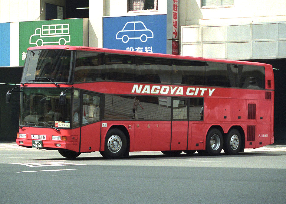 名古屋遊覧バス あおい P-GA66T